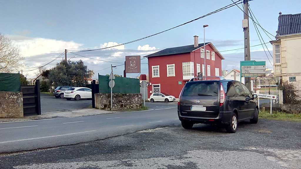 Vista dos Corrás, Serantes.